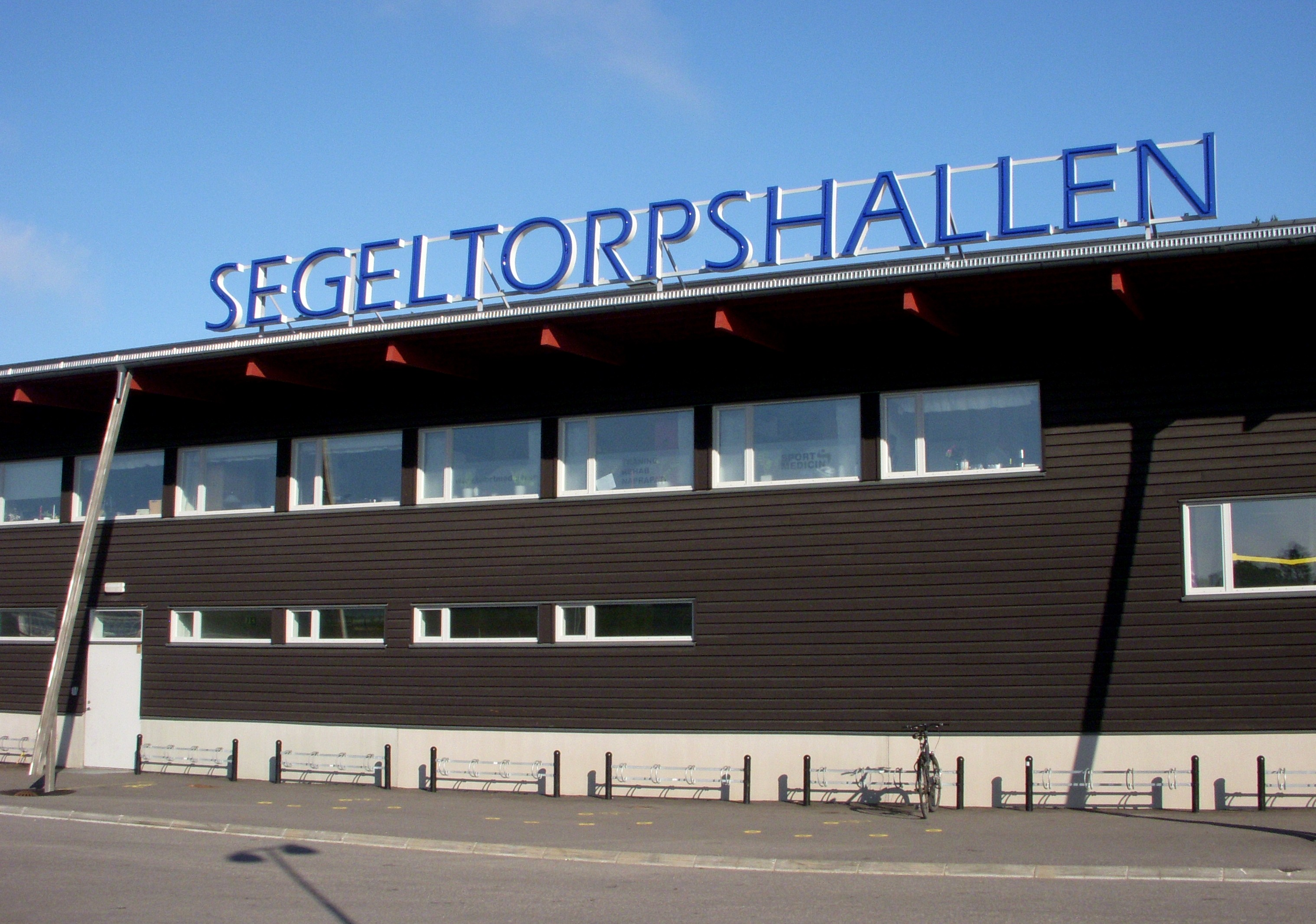 Segeltorpshallen i Segeltorp, Huddinge